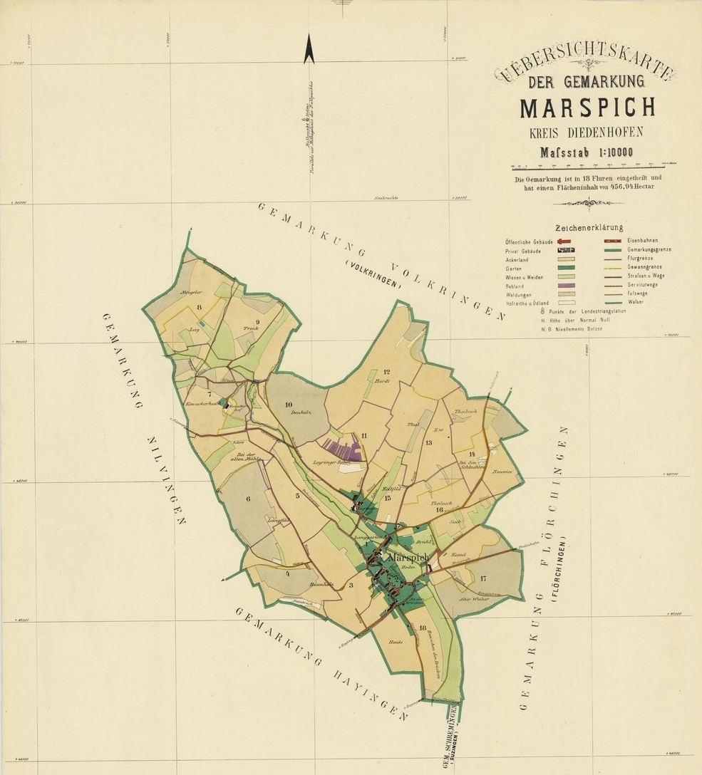 Plans cadastraux -- France -- Marspich (Moselle). Cadastre établi en 1821, revu en 1893.